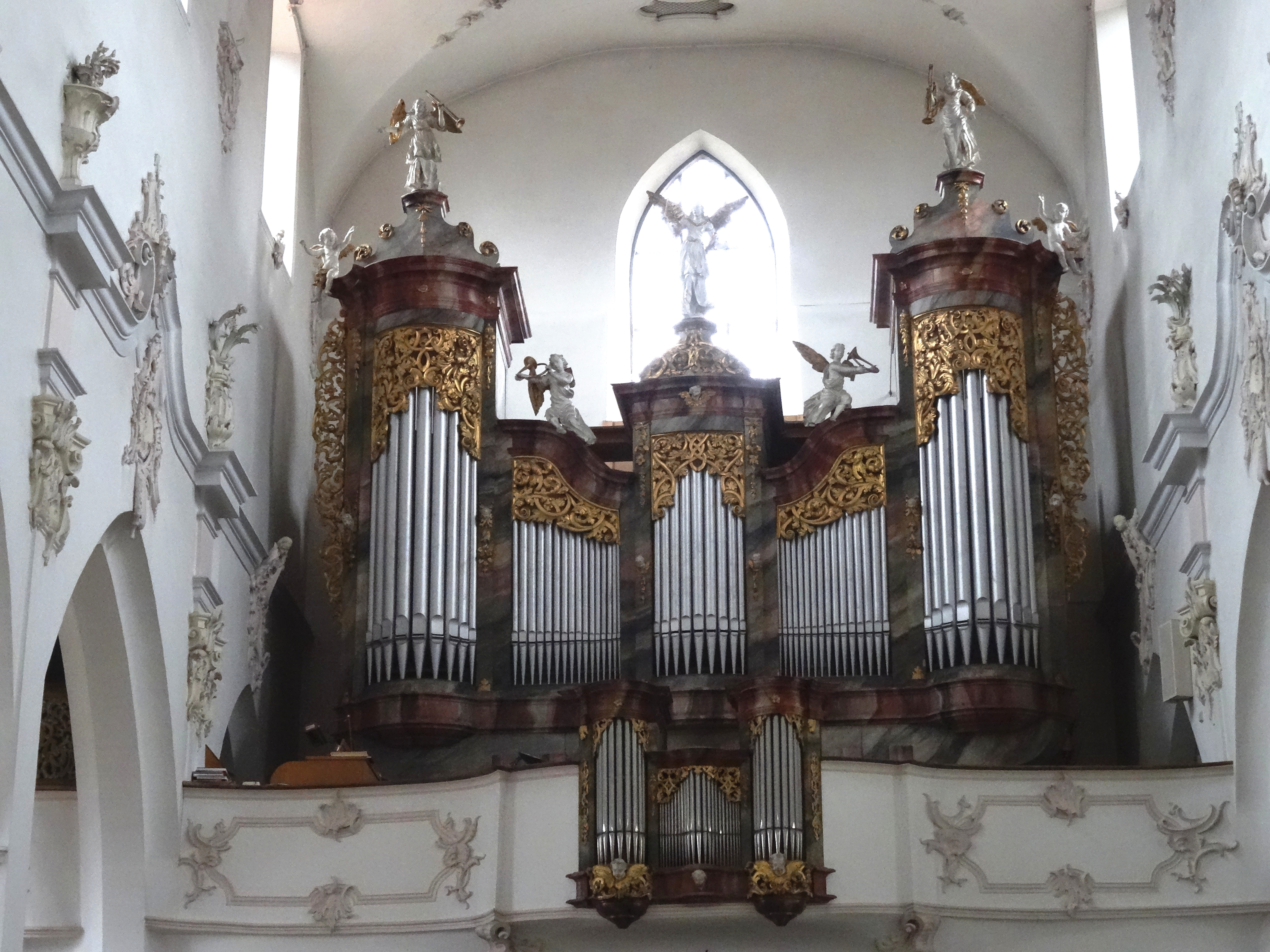 Orgelempore der Franziskanerkirche in Überlingen (Bodensee)